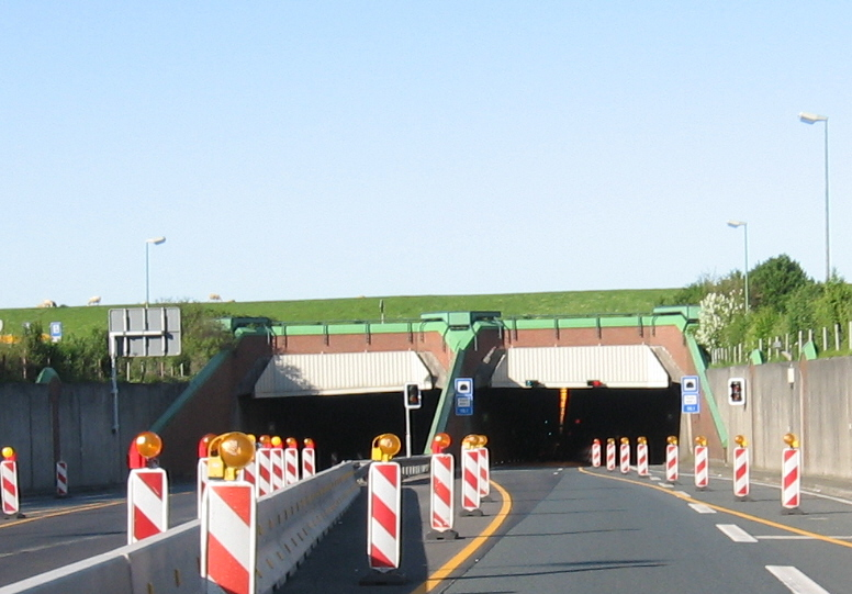 Emstunnel A31